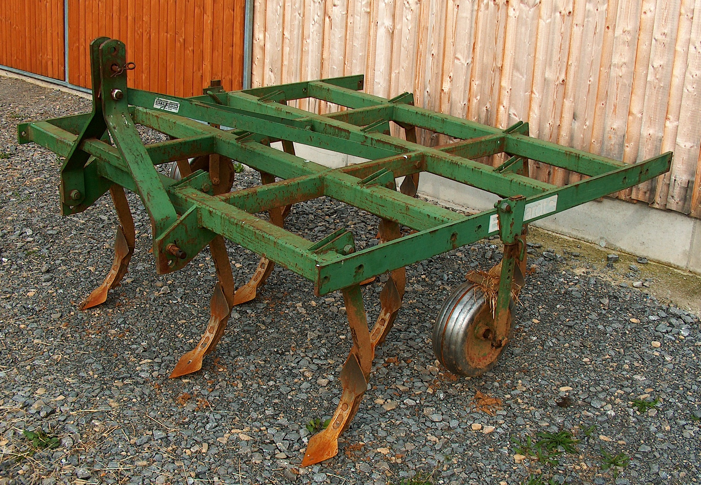 Grubber der Firma Eberhardt mit elf Zinken und vier Balken ohne Nachläufer (vermutlich Modell Gazelle). Der abgebildete Grubber wurde wohl zwischen 1980 und 1993 hergestellt, da bereits der Schriftzug "BIDELL" unterhalb der Eber-Logos zu sehen ist, aber die PLZ ist noch vierstellig.